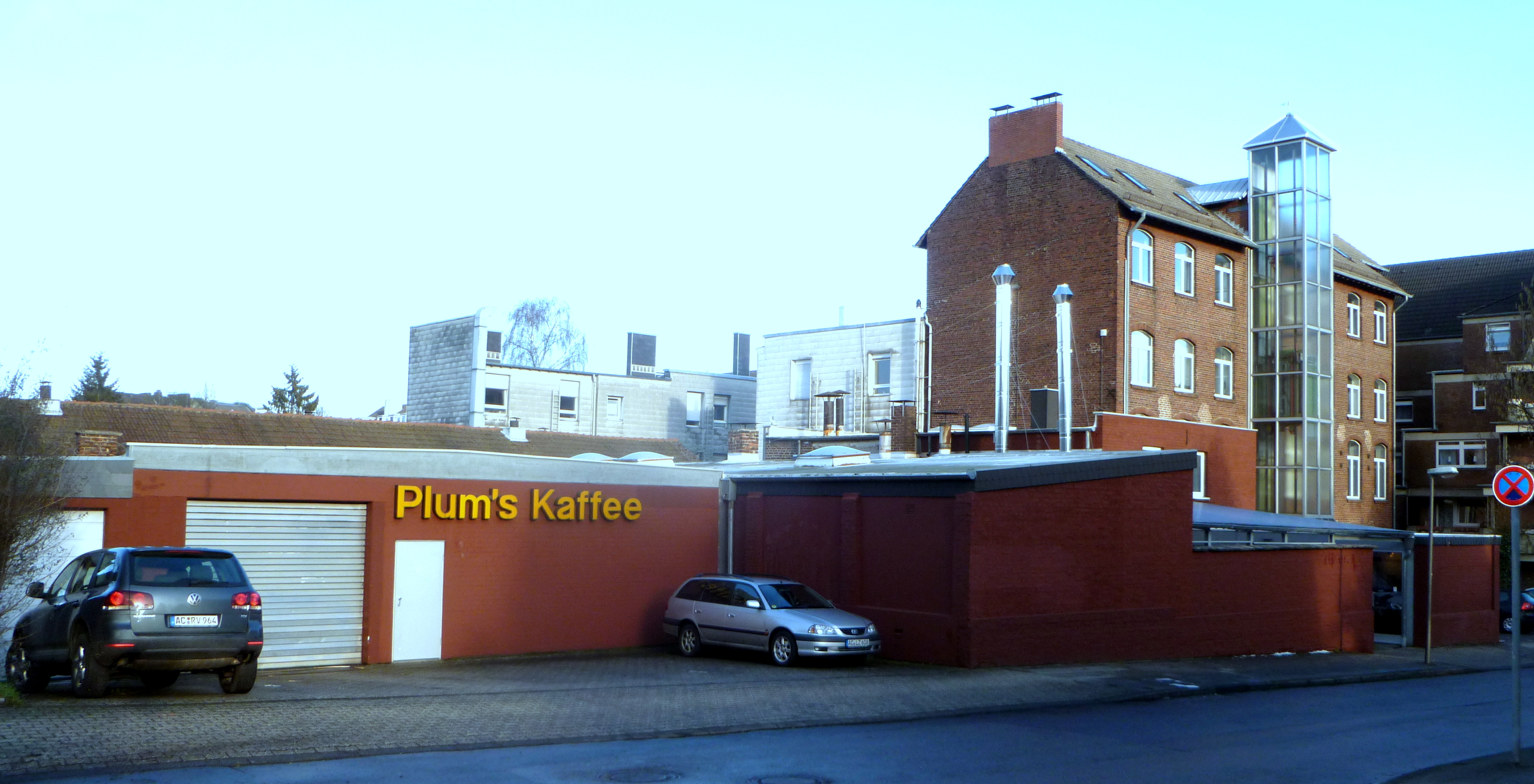 Zentrale Plums-Kaffee in Aachen